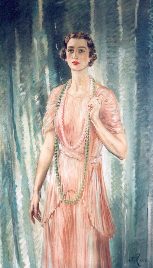 Portrait de Mrs Edwin D. Morgan Jr